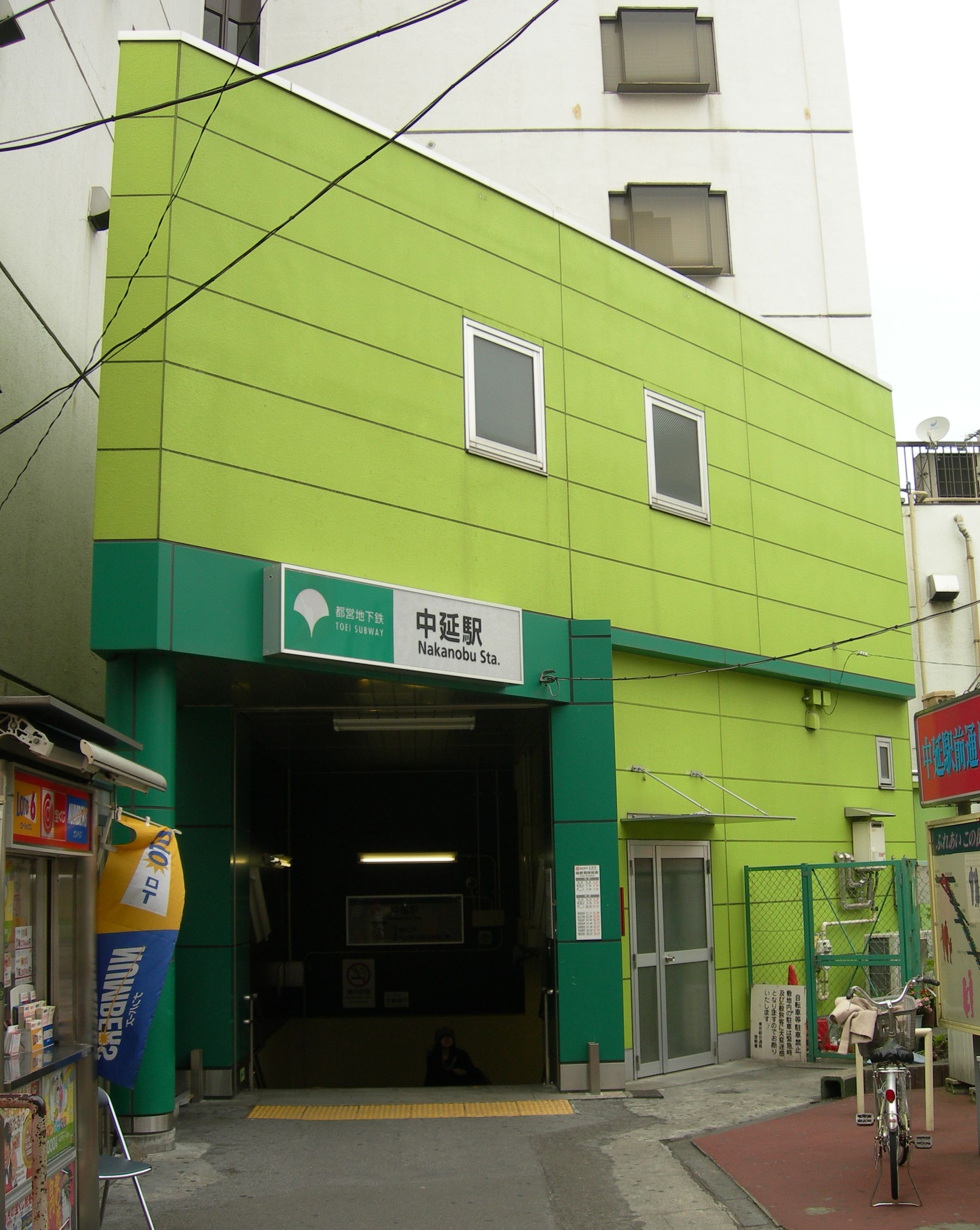 中延駅A3出入口（都営地下鉄浅草線）